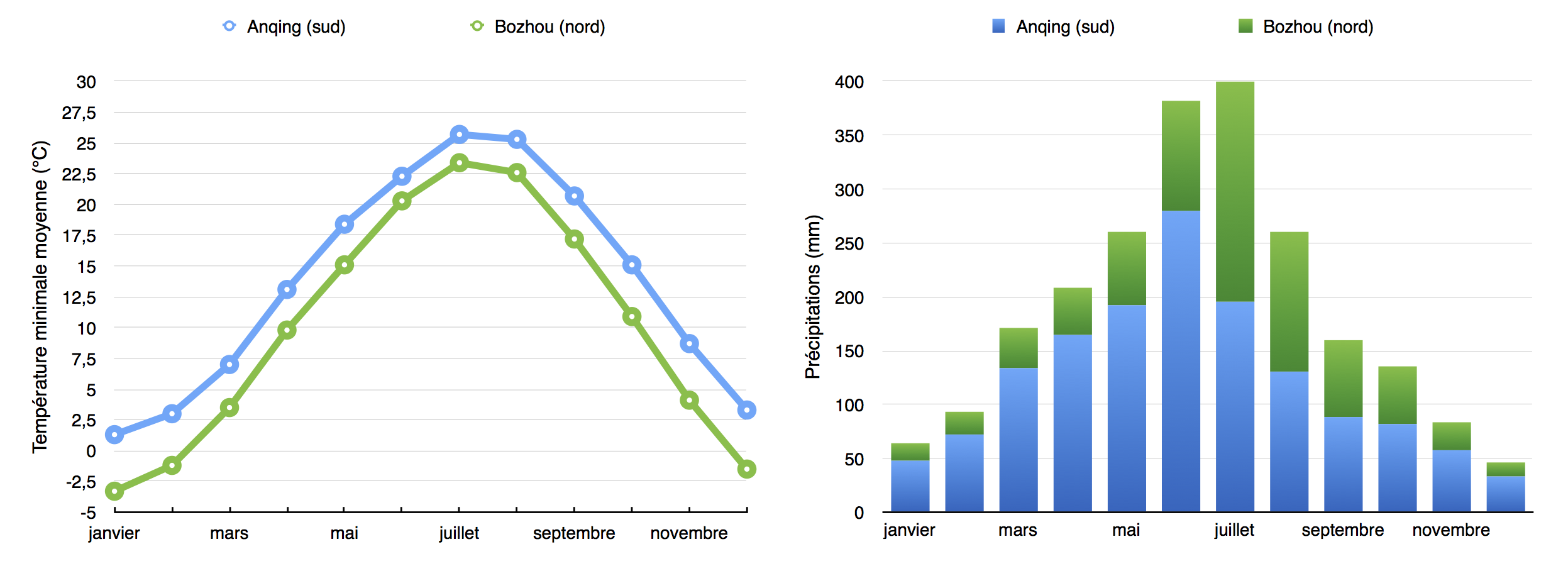 Comparaison du climat au nord et au sud de l'Anhui. Source : China Meteorological Administration